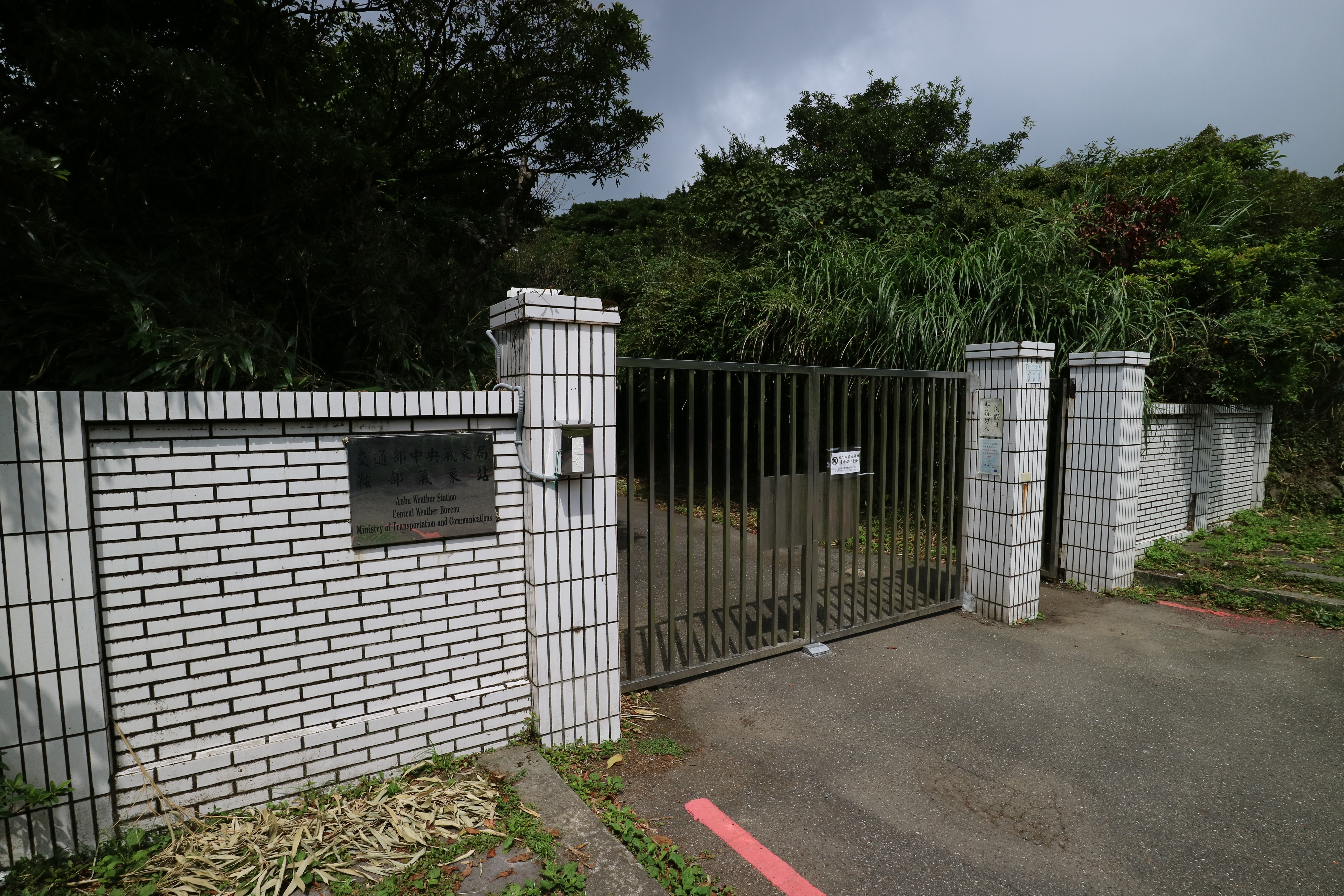 中文（台灣）: 交通部中央氣象局鞍部氣象站大門